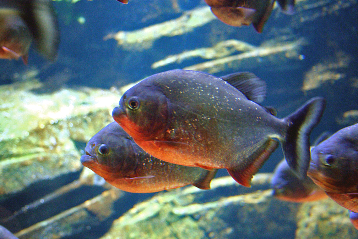 Pygocentrus nattereri (piranha à ventre rouge)